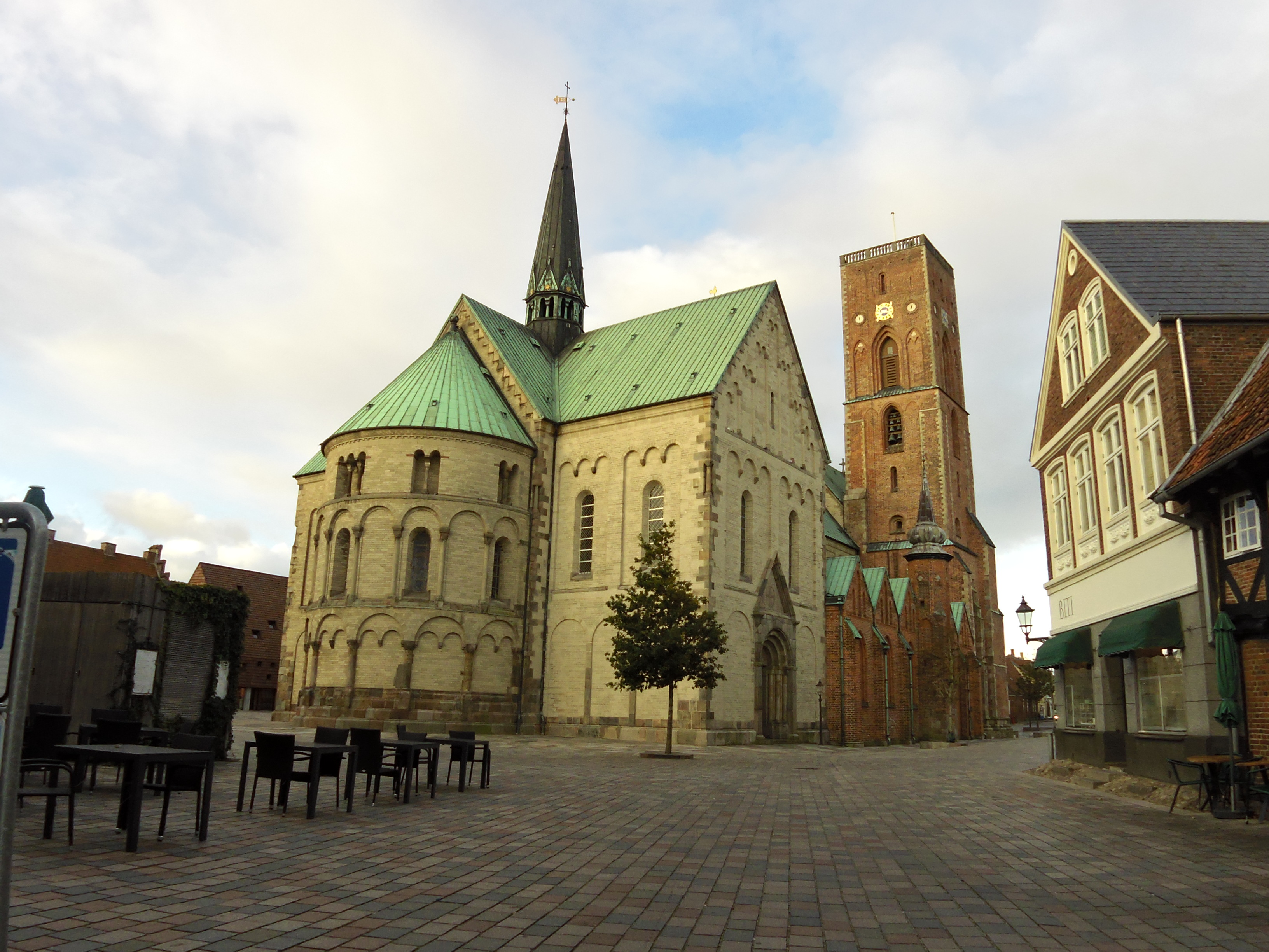 Ribe Domkirke